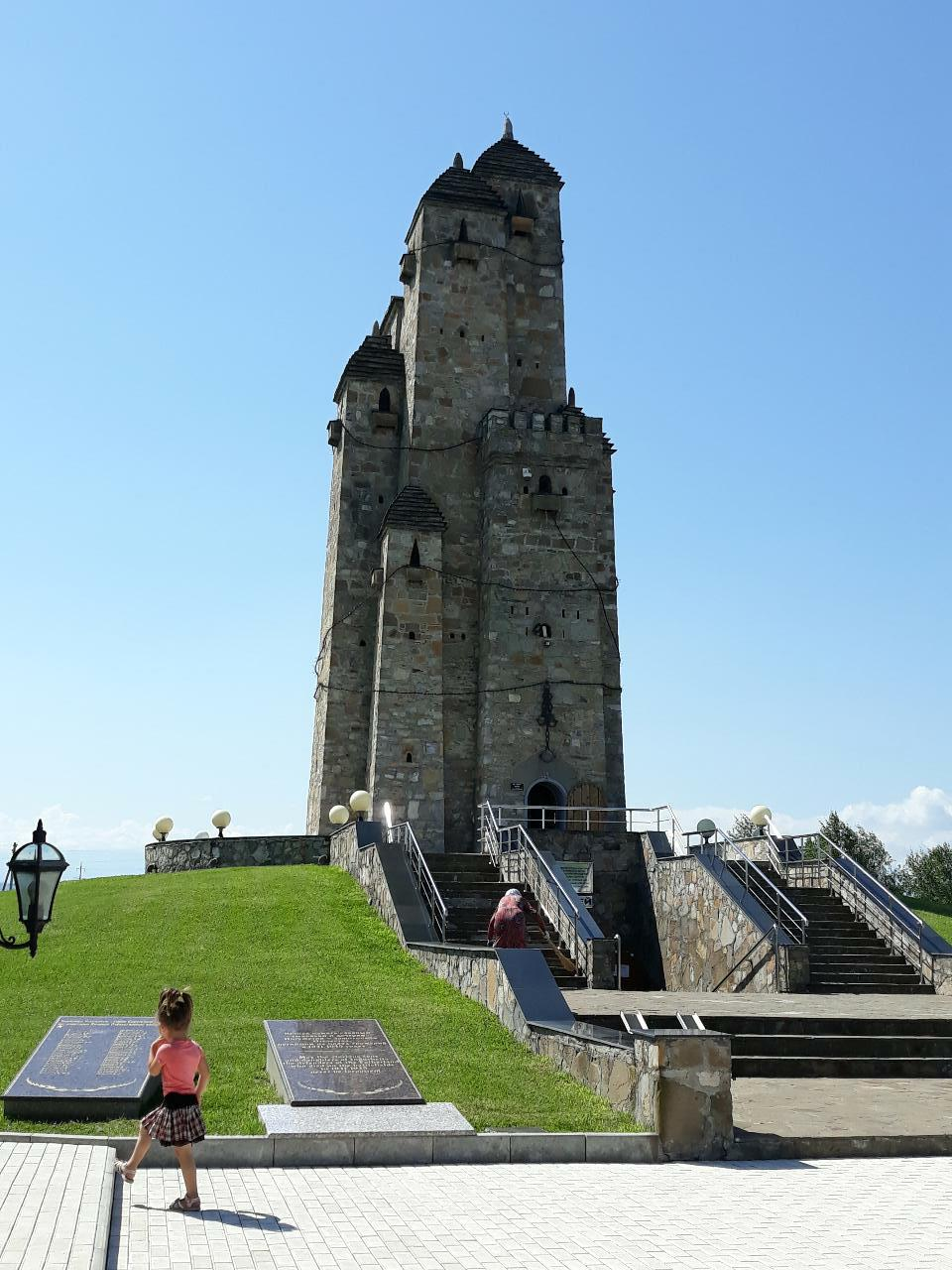 Экскурсия в горную Ингушетию, 30.06.2019